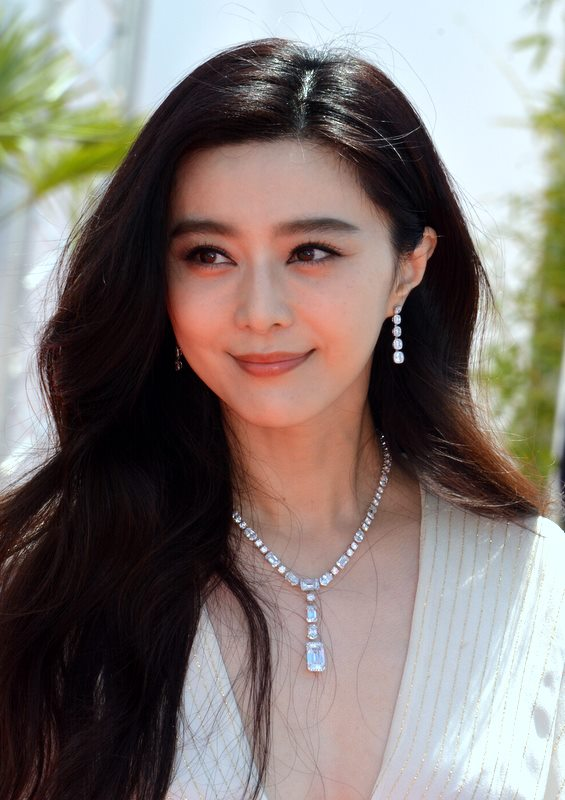 Fan bingbing au festival de Cannes